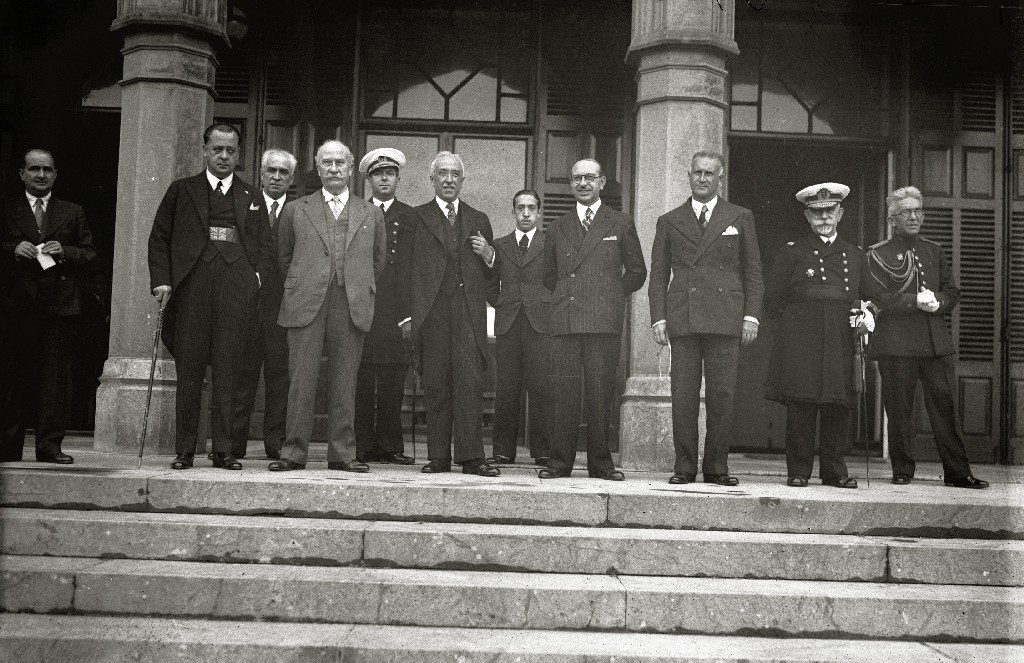 Título original: Visita de Niceto Alcalá Zamora y del ministro de Hacienda Indalecio Prieto a San Sebastián (9/10) Localización: San Sebastián (Guipúzcoa)